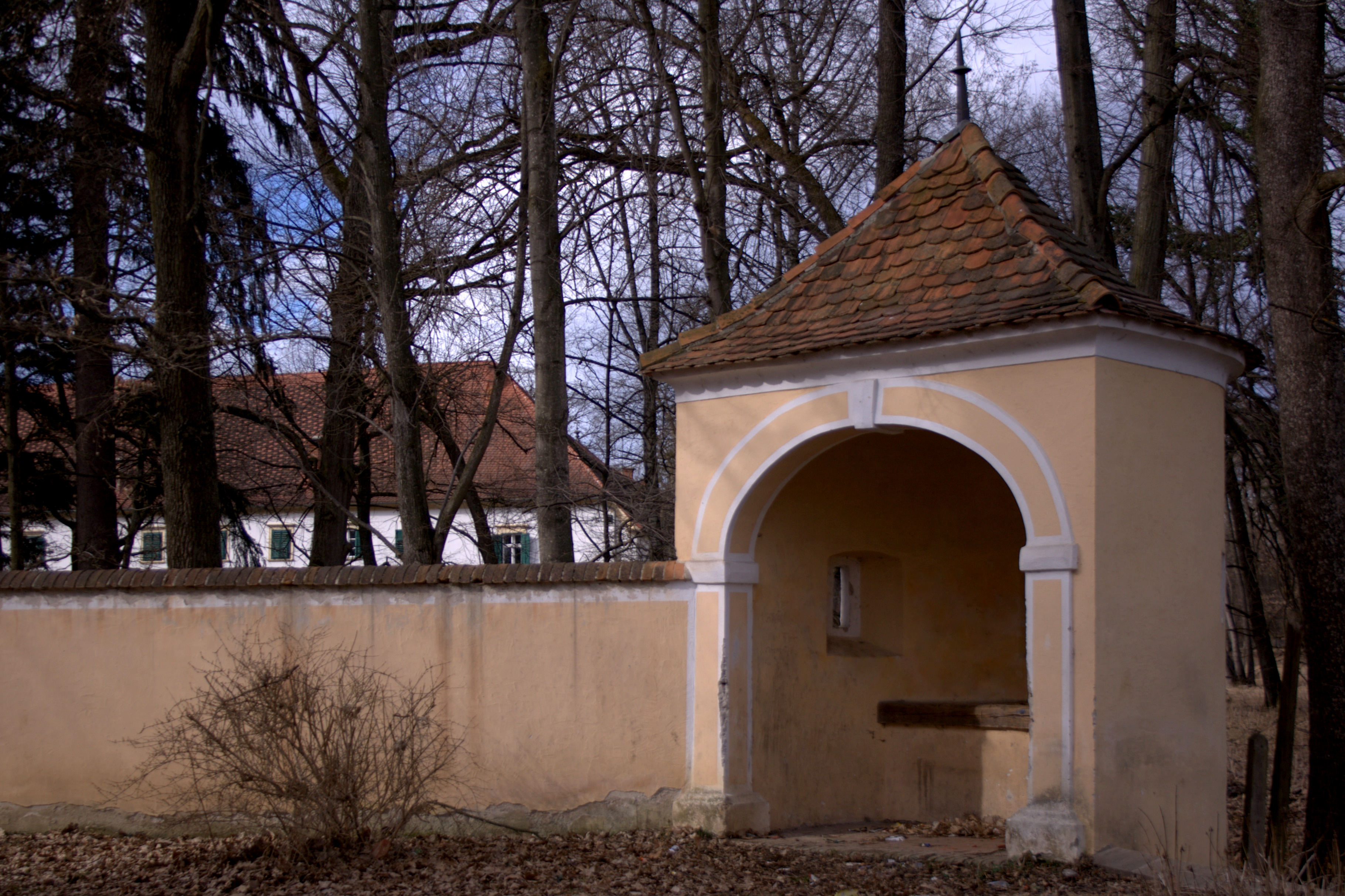 Neudau Mauer integrierter Kapelle